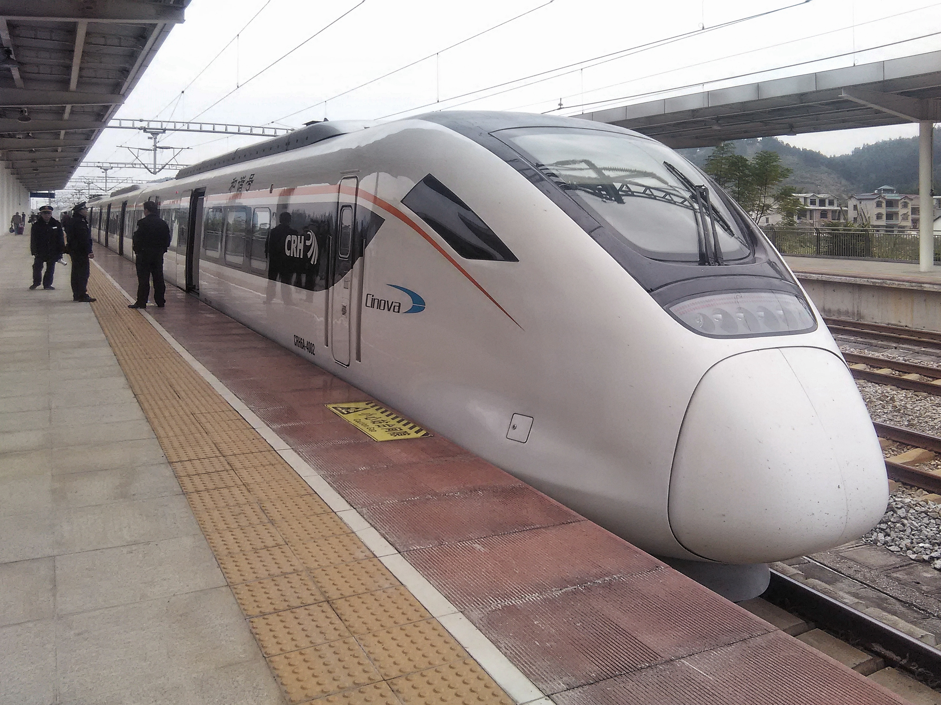 中文（中国大陆）: CRH6A 4002于鹿寨北站。